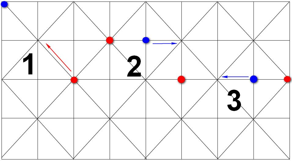 Exemples de prises au fanorona